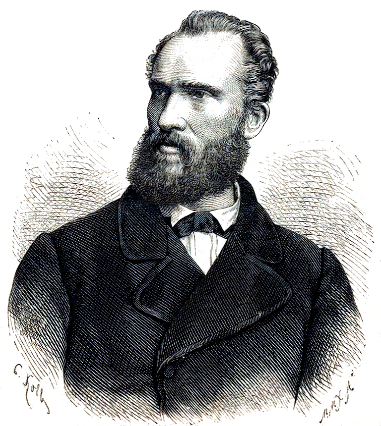 August von Kluckhohn. In: Illustriertes Unterhaltungs-Blatt: wöchentliche Beilage zum Darmstädter Tagblatt. Darmstadt, 1891.